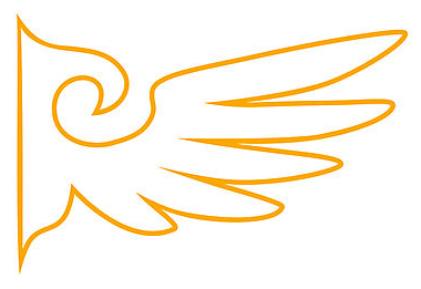 L'aquila mono-alata, stemma della famiglia Ushiromiya in Umineko no naku koro ni.